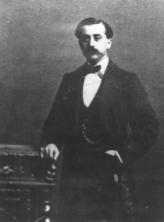 L'ingegnere Leon Gouin. circa 1870